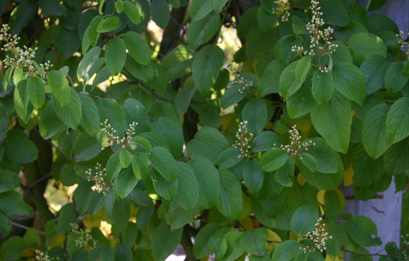 Berchemia racemosa: Total.